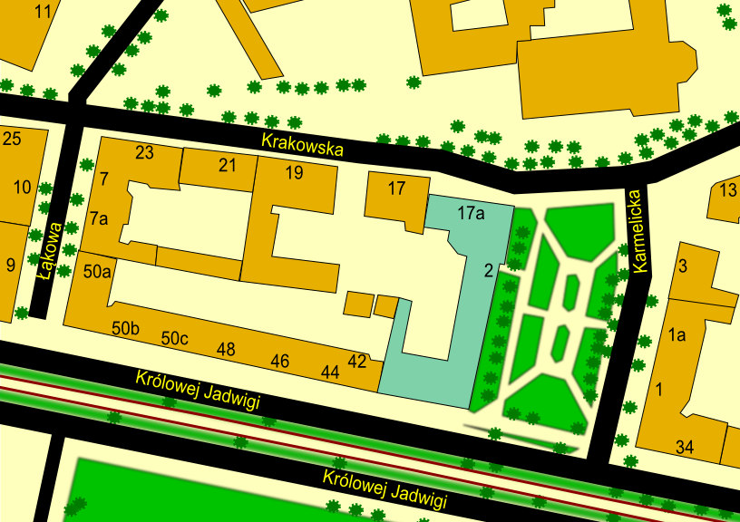 VI Liceum Ogólnokształcące im. Ignacego Jana Paderewskiego w Poznaniu; ul. Królowej Jadwigi, Krakowska, Karmelicka, Łąkowa